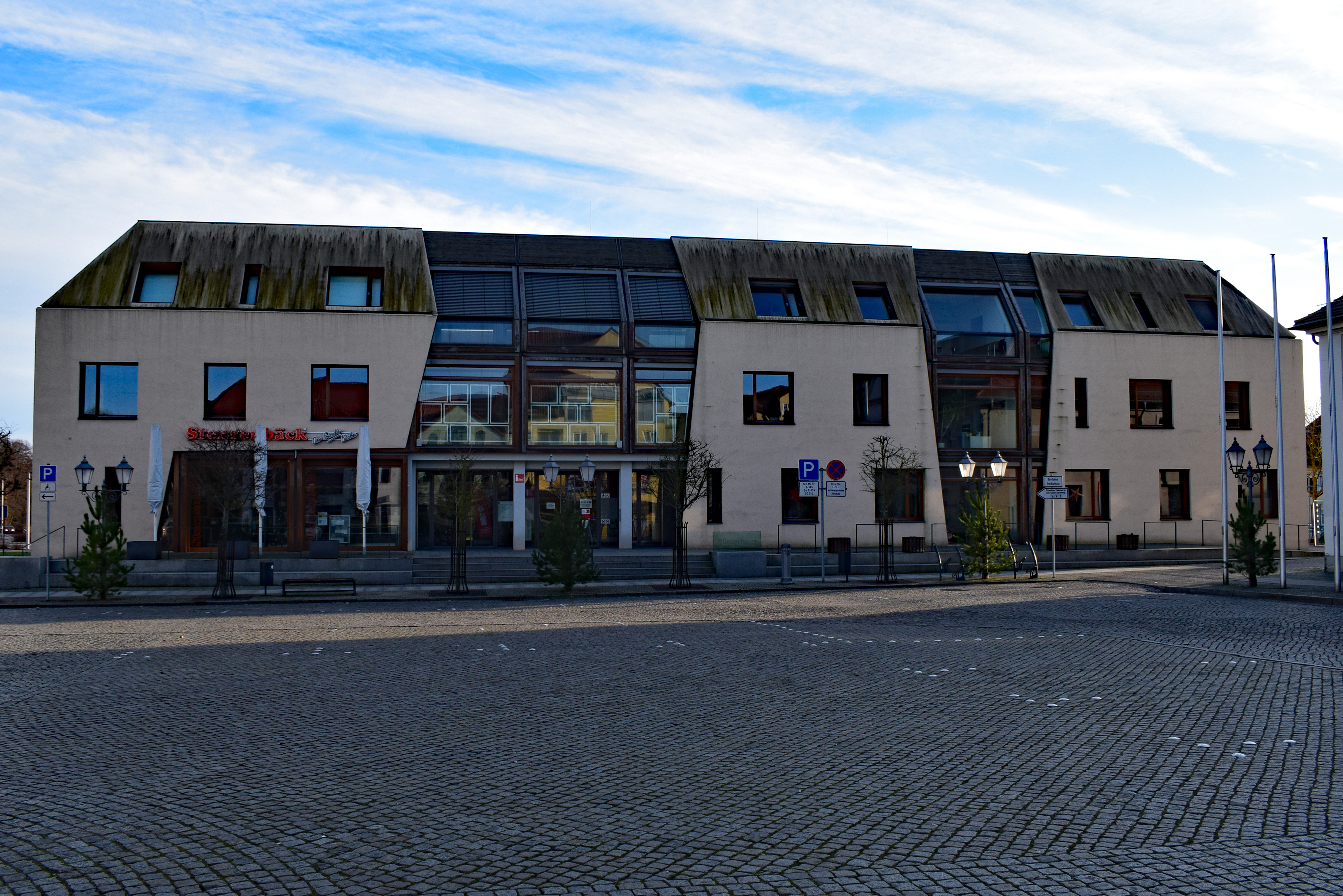 Bürgerhaus am Marktplatz in Spremberg im Dezember 2017. Deutlich sind die (Ver-) Witterungsspuren am angedeuteten Dachbereich zu erkennen.